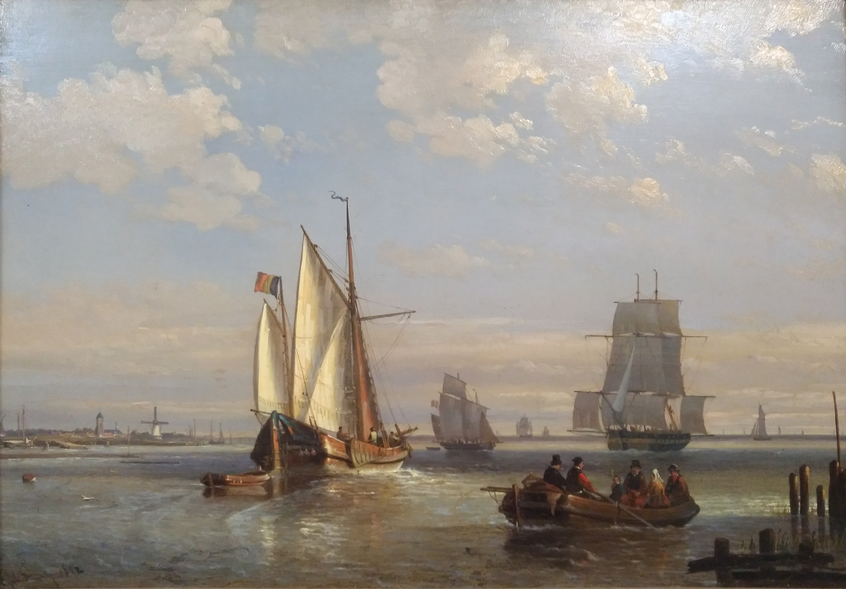 Egide Linnig, Zeilschepen en een roeiboot op de Schelde, 1852. Collectie Archief Gent, legaat dr. Jozef Guislain